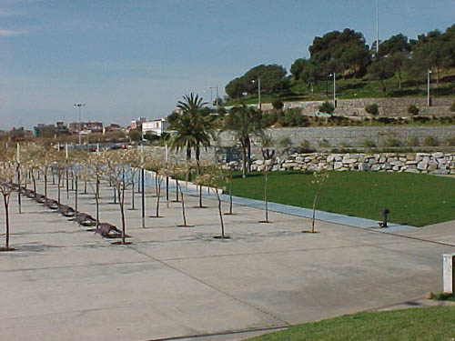 Turó de Caritg, plaza del Centenario.